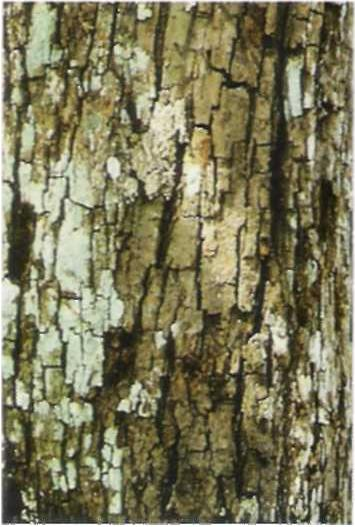 Foto genérica da casca da árvore de freijó (Cordia goeldiana)